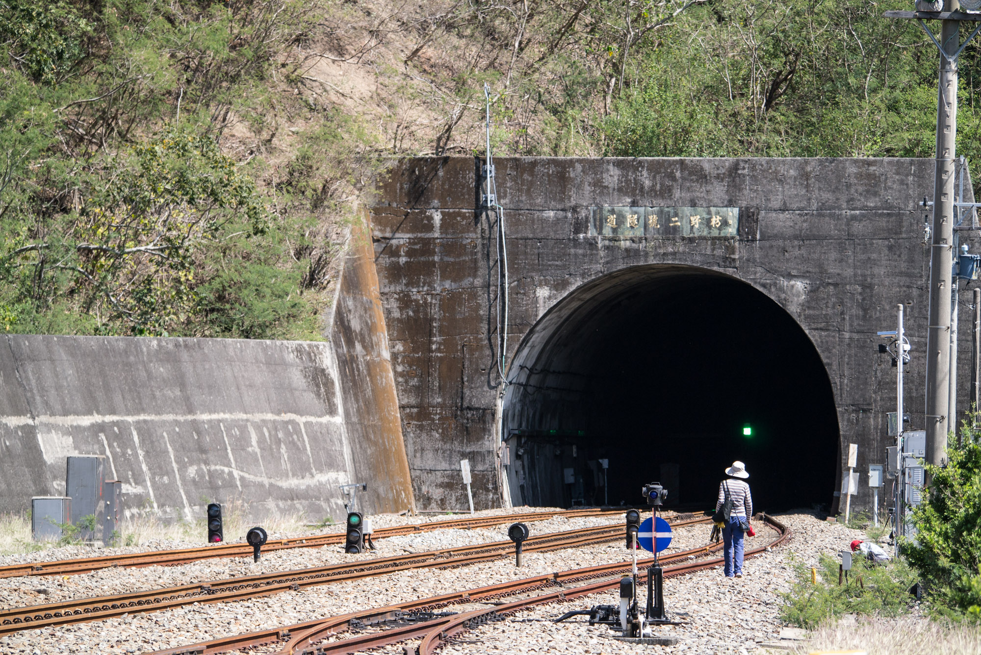 枋野二號隧道口